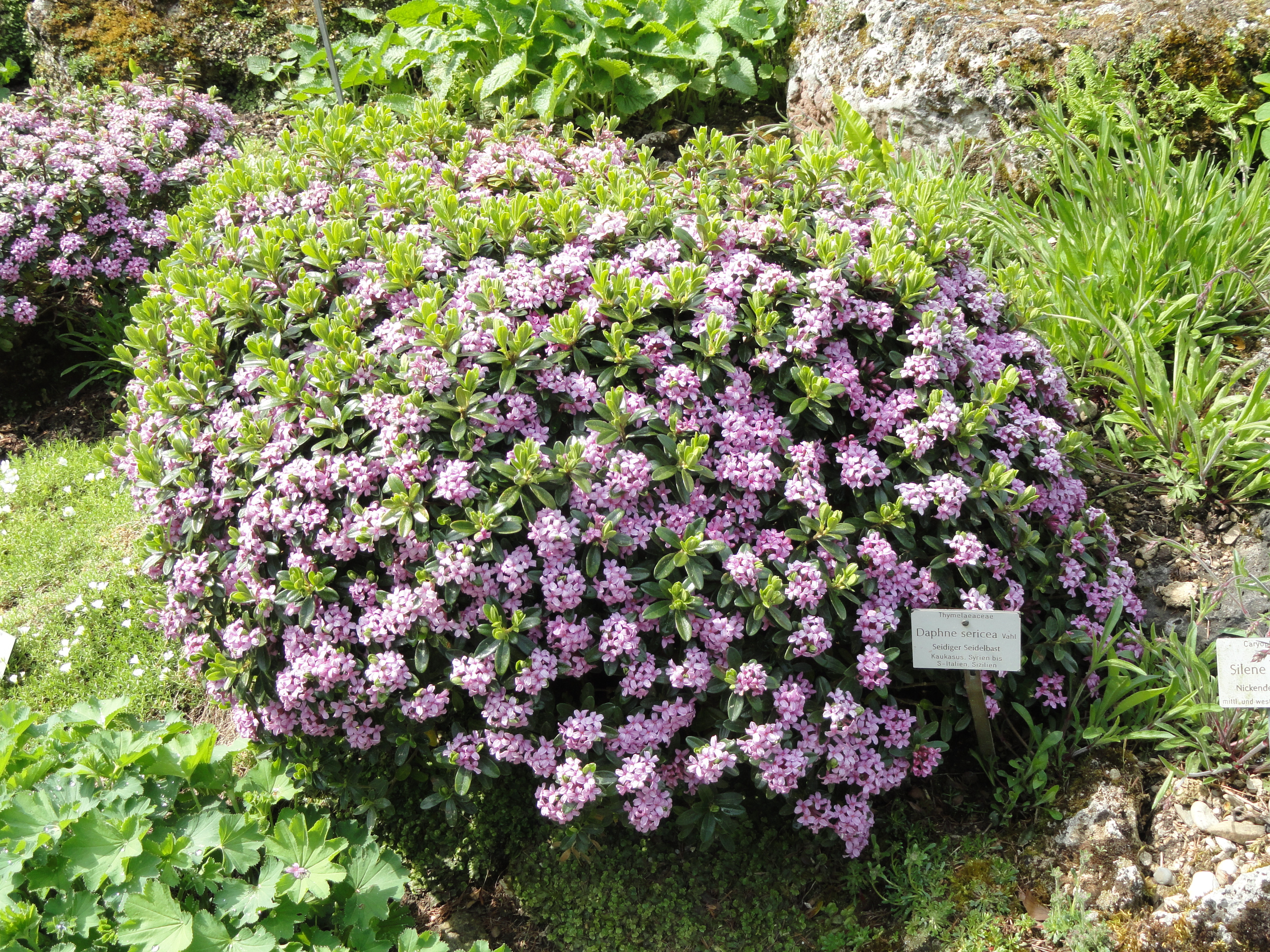 Daphne sericea specimen in the Botanischer Garten München-Nymphenburg, Munich, Germany.